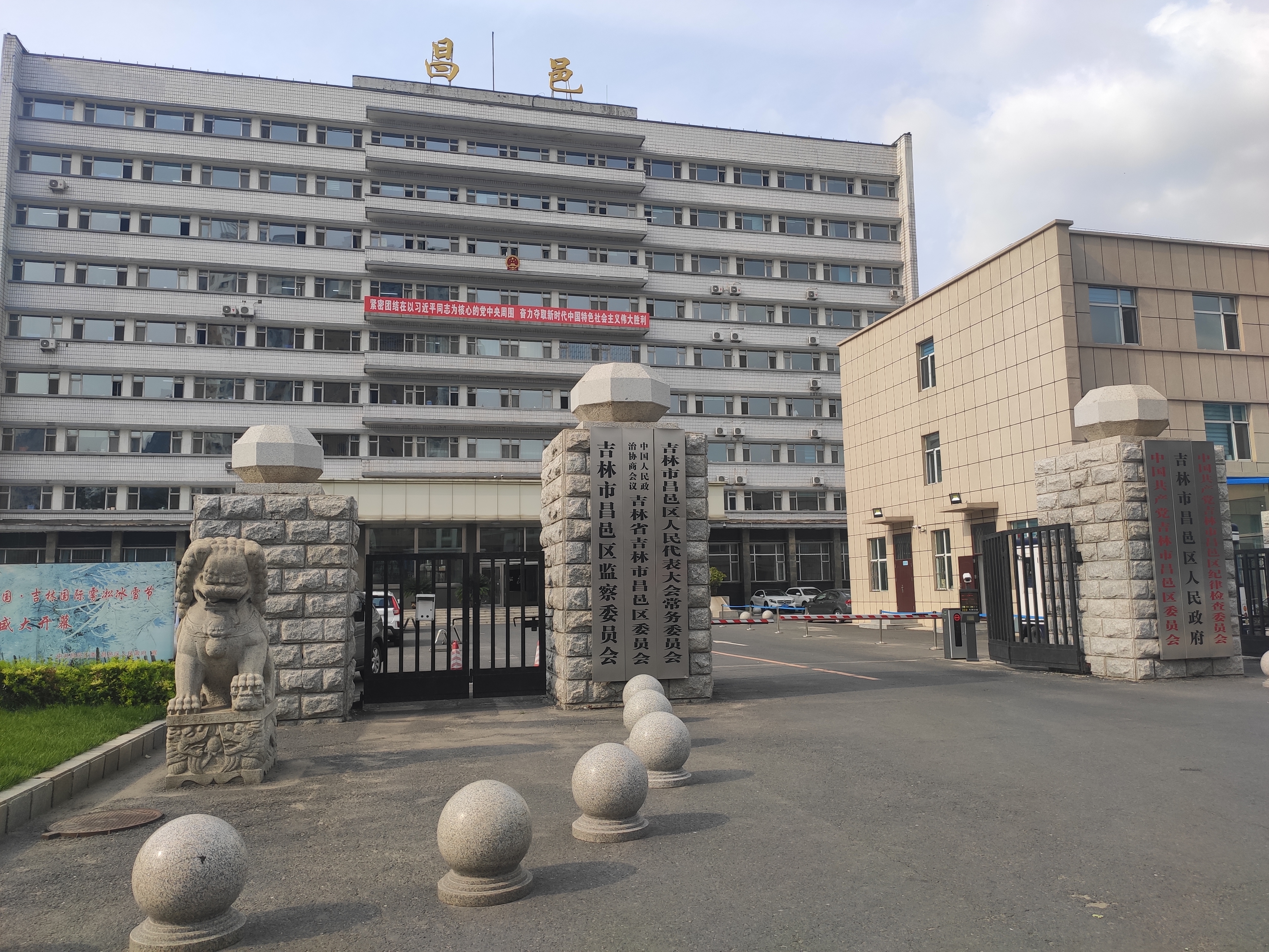 昌邑区政府大楼